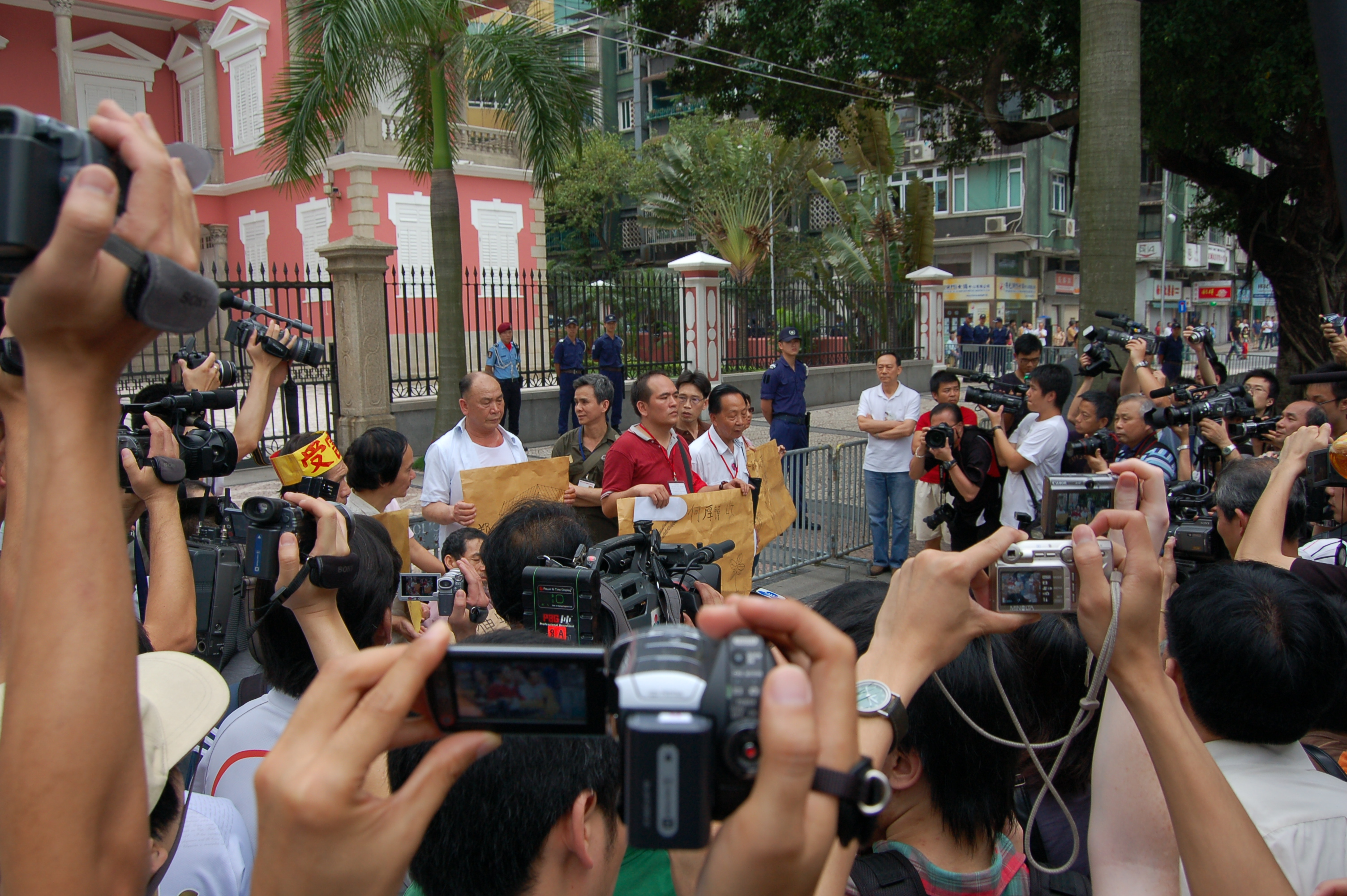 2008 澳門勞動節遊行 Macau Labor Day March